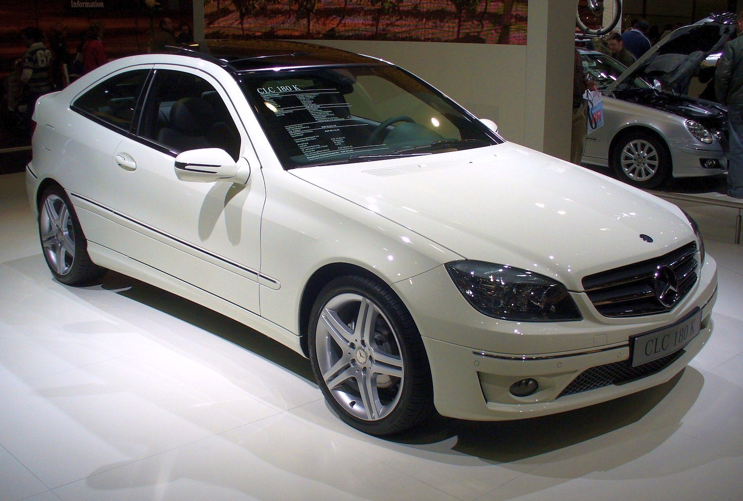 Mercedes-Benz CL203 - CLC 180 Kompressor